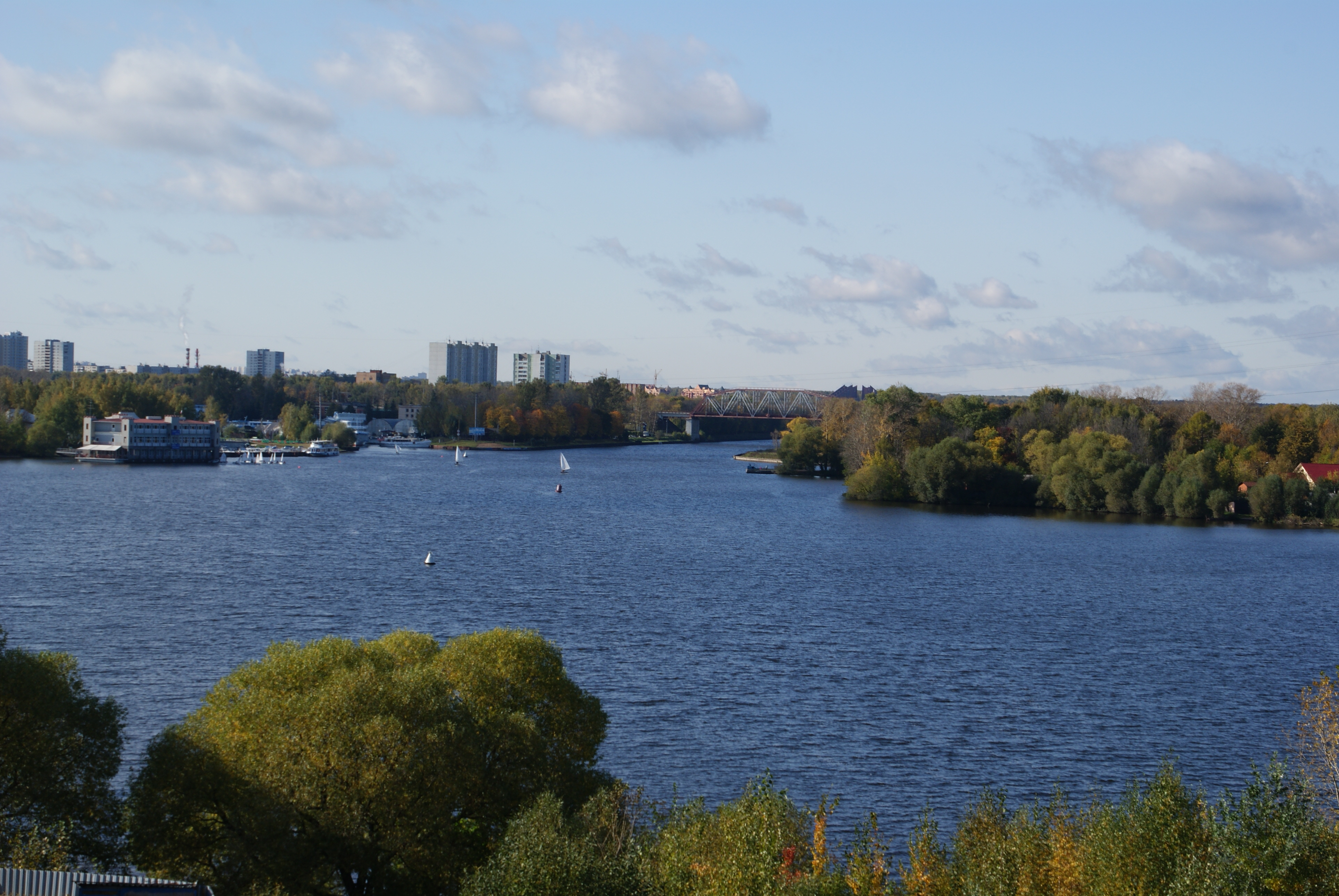 Клязьминское вдхр у Водников